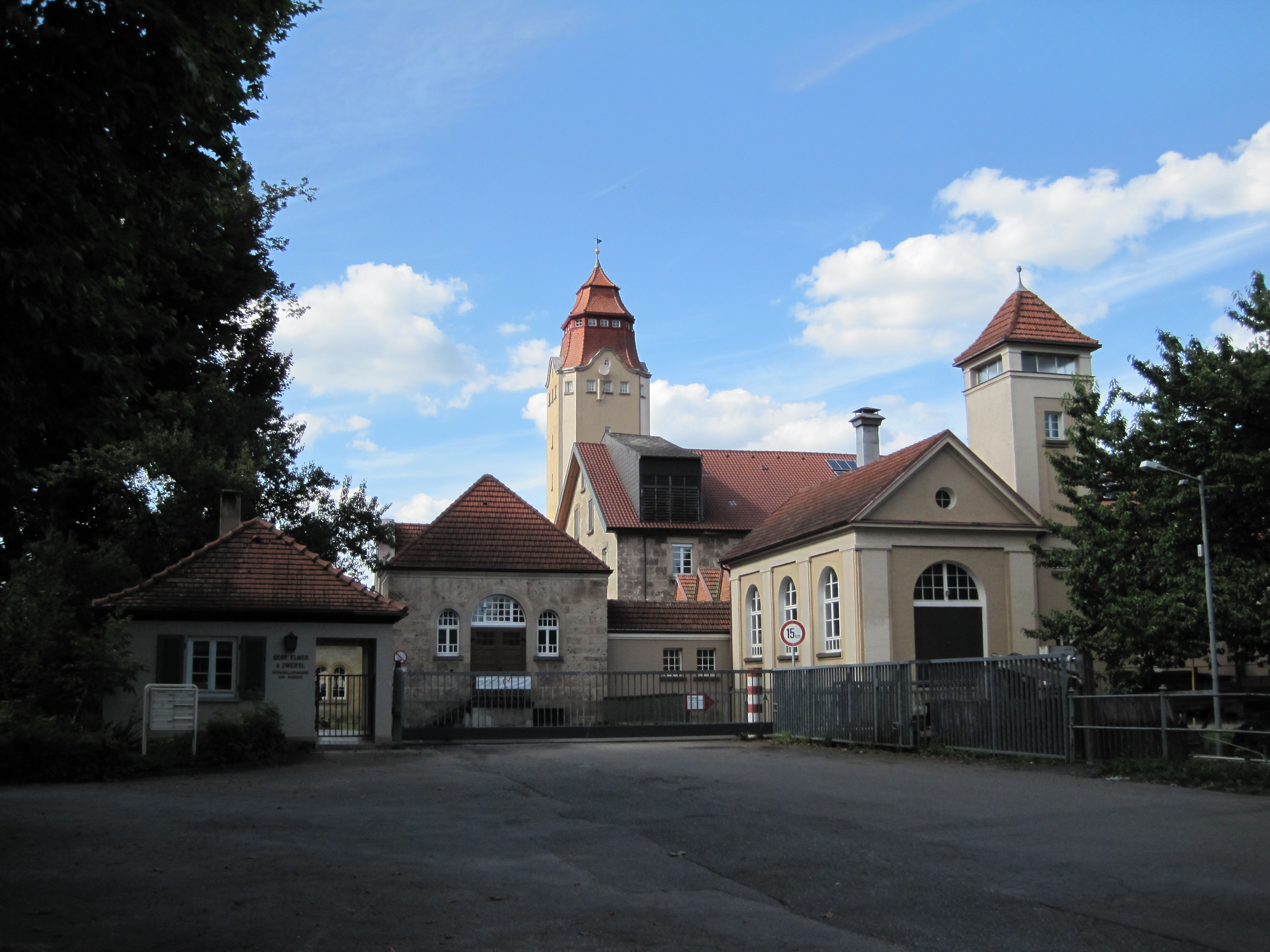 Gebäude in D-72658 Bempflingen Buildings in Bempflingen, Germany